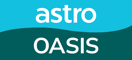 Logonya